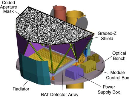 Swift's instrument : diagram Burst Alert Telescope (BAT)